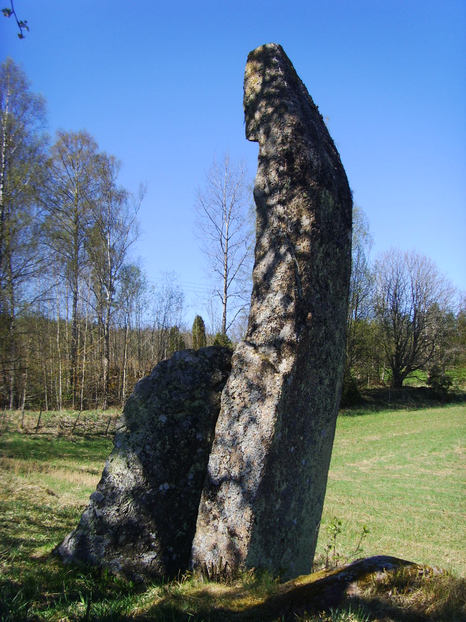 Utanför Bredestads kyrka i Aneby kommun i Jönköpings län hittas en rest sten i granit med den imponerande höjden 3, 2 meter (och den stor lutad mot en sten i kvartsit 1, 5 hög). Den torde vara rest under järnåldern som en fruktbarhetssymbol och har en motsvarighet i Rödsten vid Grebo i Åtvidabergs kommun. I anslutning till stenen i Bredestad finns också några gravar, mindre resta stenar och två stora block. Odlingslandskapet i Bredestaddalen har ett rikligt antal fornminnen från denna tidsepok i form av runstenar, gravfält, järnframställningsplatser och boplatser. År 2000 grävdes ett långhus fram endast ca 500 meter sydöst om fallosstenen, som ligger invid en järnframställningsplats, Örle gravfält med drygt 100 gravar och en runsten, som påträffades hösten 1952 vid reparationen av Bona gästgivaregård. Den senare invid Bredestads 1100-tals kyrka, byggd på en gammal offerkulle där Vibäcken rinner fram. Väster om fallosstenen finns Bredestads gravfält med drygt 20 gravar.